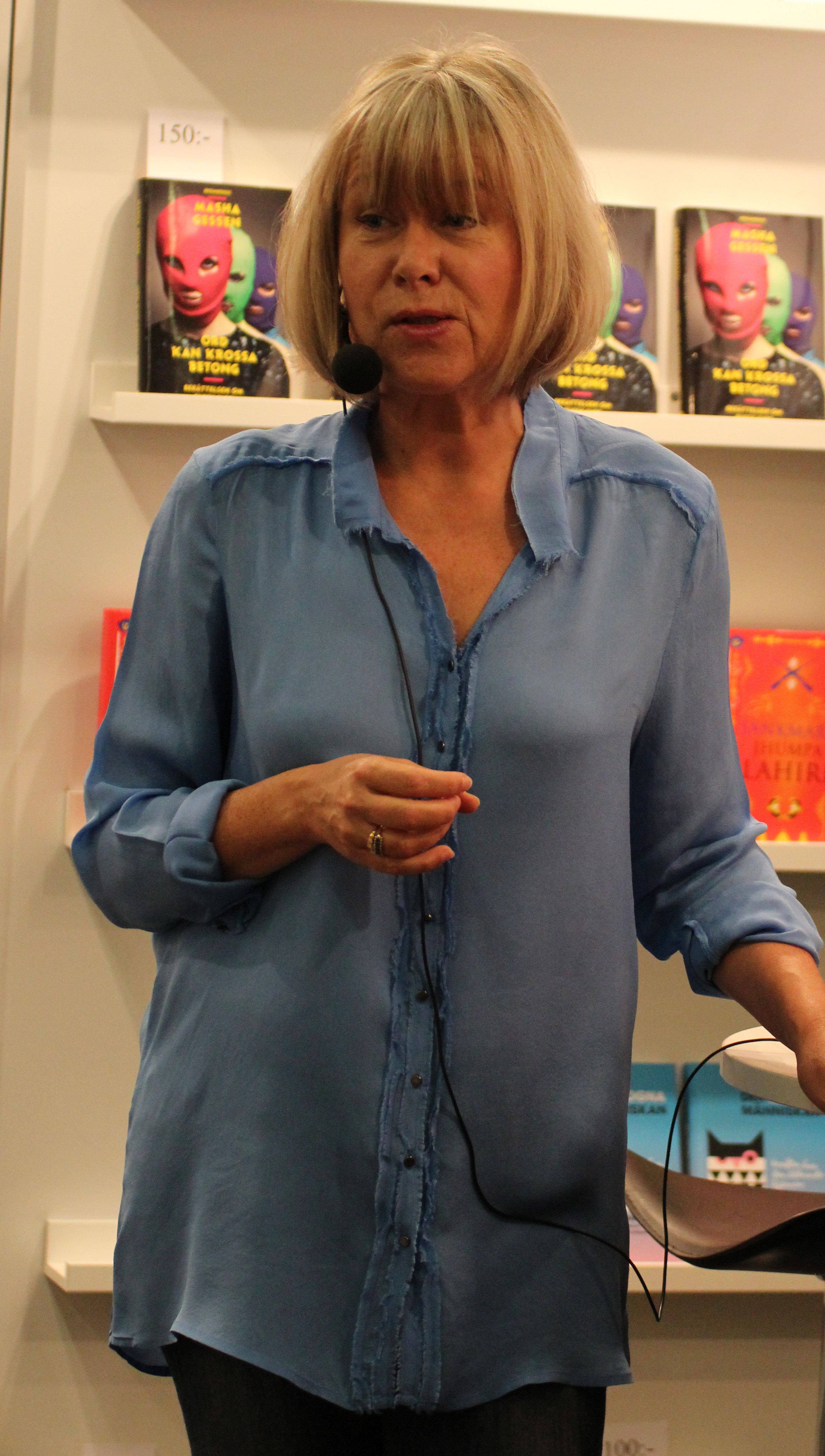 Kristina Kappelin på Bok- och biblioteksmässan i Göteborg 2014